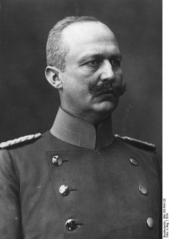 Erich Ludendorff 1914. Generalmajor Erich Ludendorff, Chef des Generalstabes der Hindenburg-Armee, bei seiner Ernennung zum Generalleutnant [Porträt Erich Ludendorff] Abgebildete Personen: Ludendorff, Erich: 1865-1937, General, kaiserliches Heer, MdR, NSDAP, Tannenbergbund, Deutschland (PND 118574841)